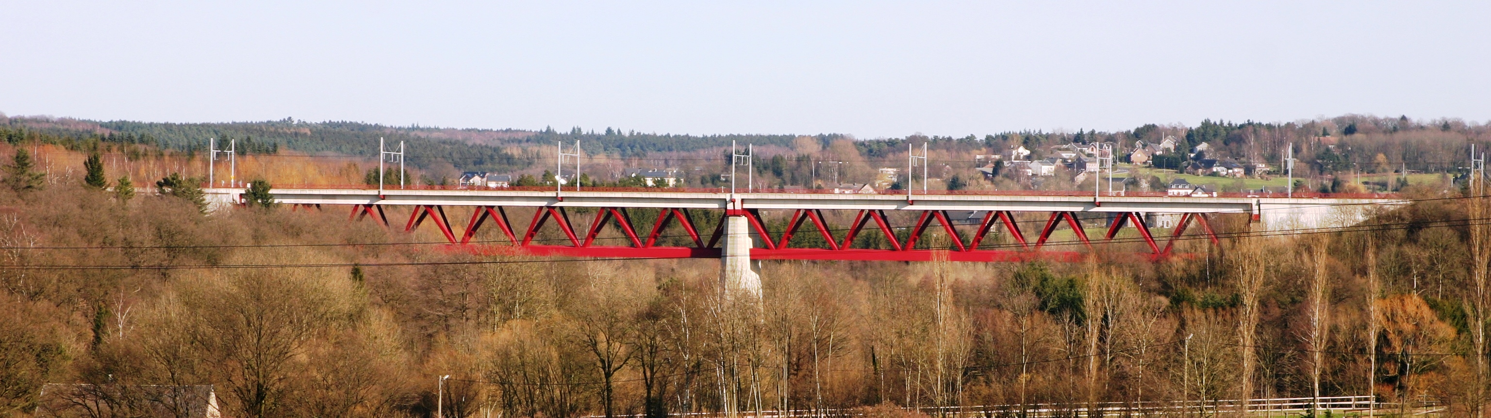 Hammerbréck bei Hauset LGV Linn Léck-Köln, och Deel vun der Linn 37 Léck-Hergenrath.